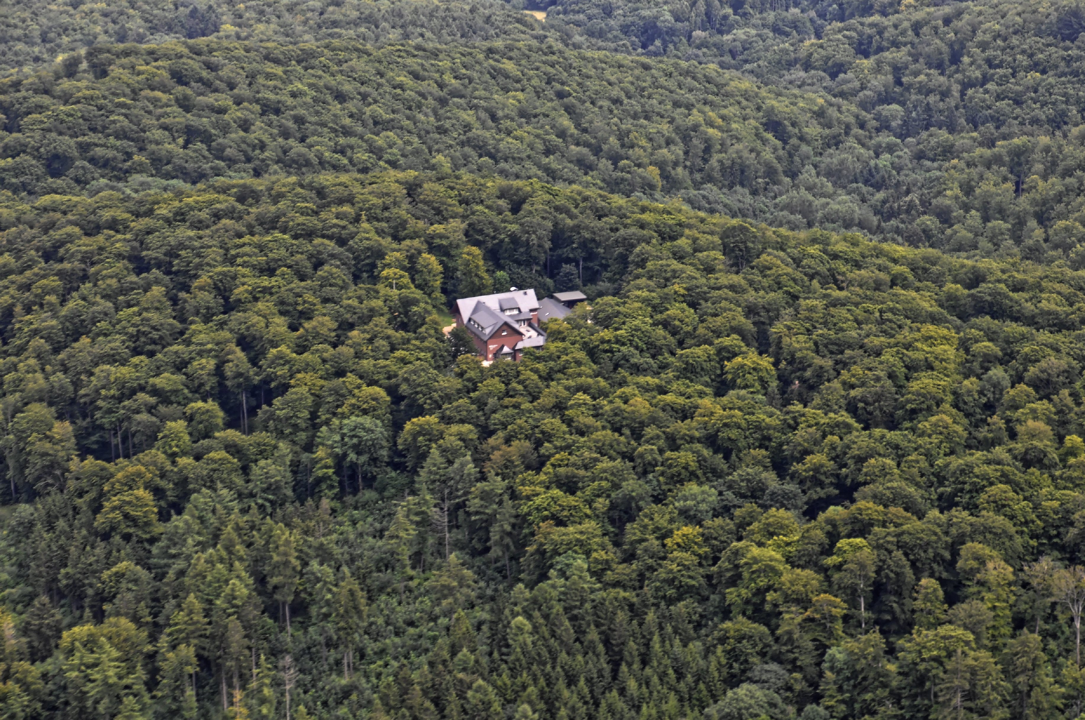 Bilder vom Flug Nordholz-Hammelburg 2015: Das Waldhotel Elfbuchen am Elfbuchenturm auf dem Elfbuchen, einem Nordausläufer des Bachbergs im Hohen Habichtswald.